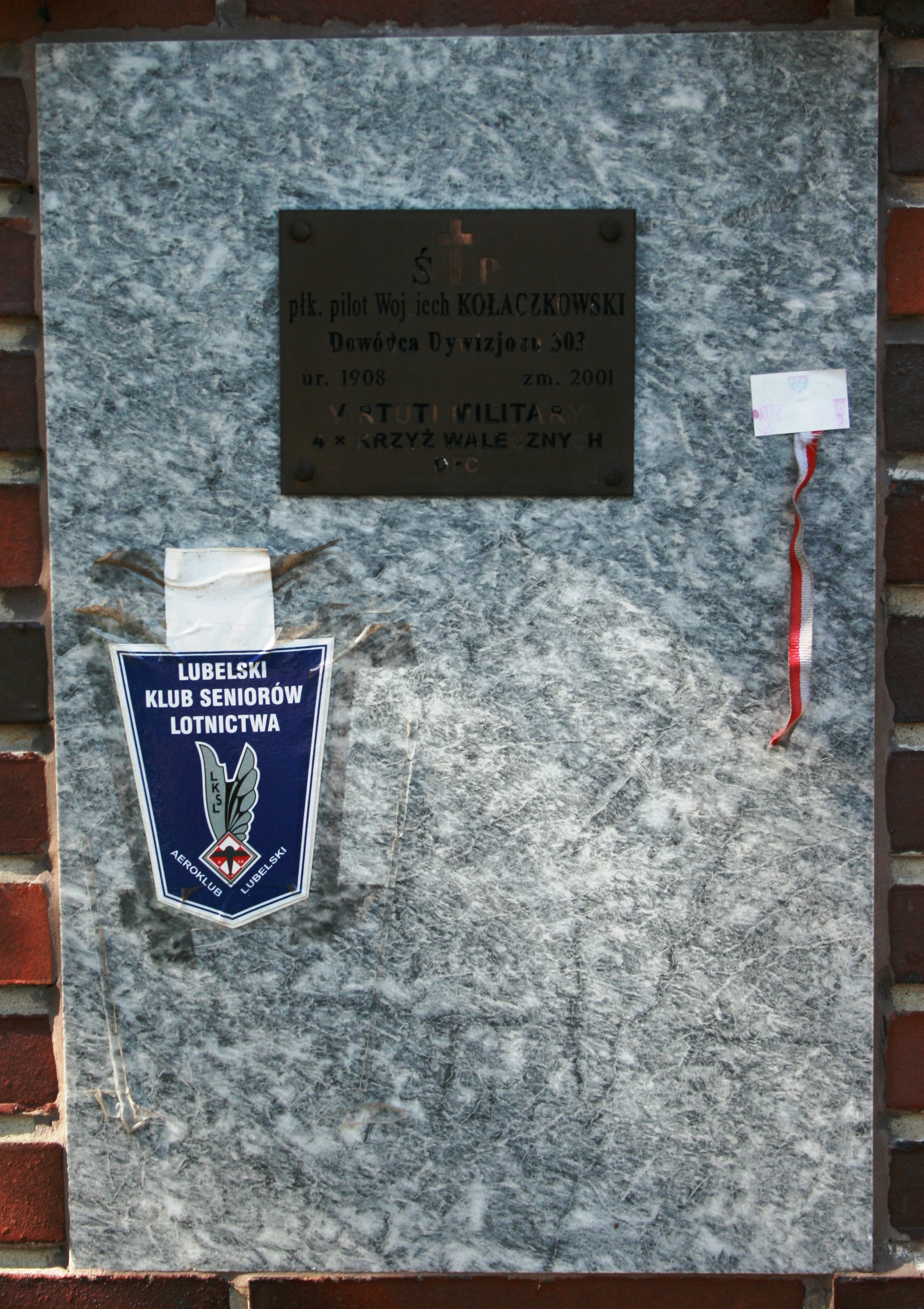 Kwatera Pierwszej Samodzielnej Brygady Spadochronowej na Powązkach Wojskowych w Warszawie